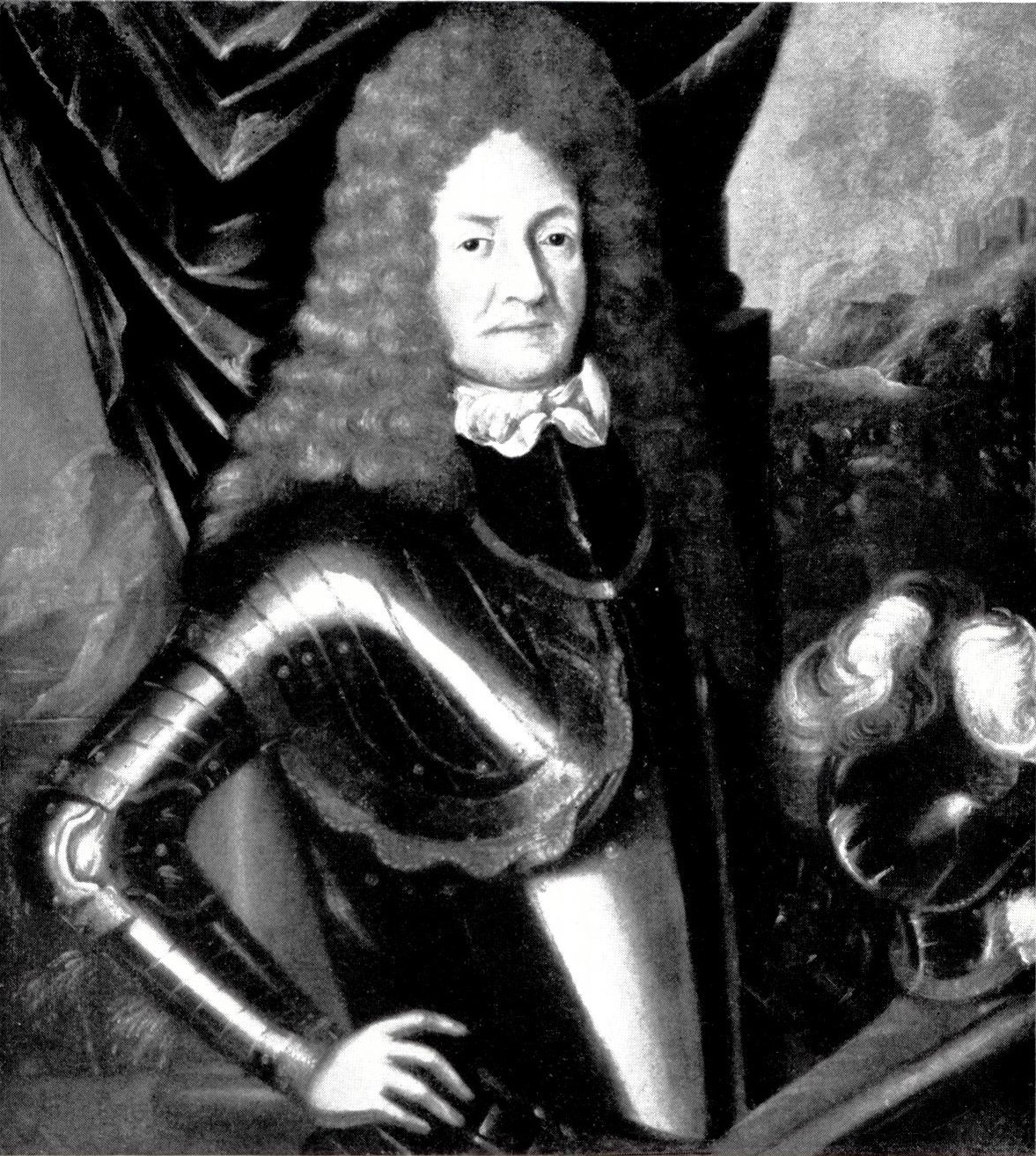 Kurt Riedesel Freiherr zu Eisenbach (1603-1665), 13. Erbmarschall von Hessen